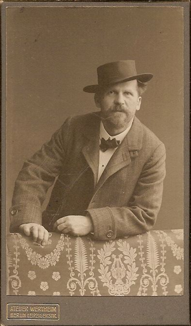 german painter Richard Eschke